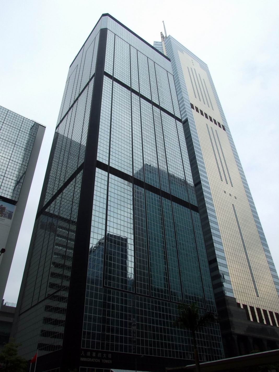 入境事務大樓外貌